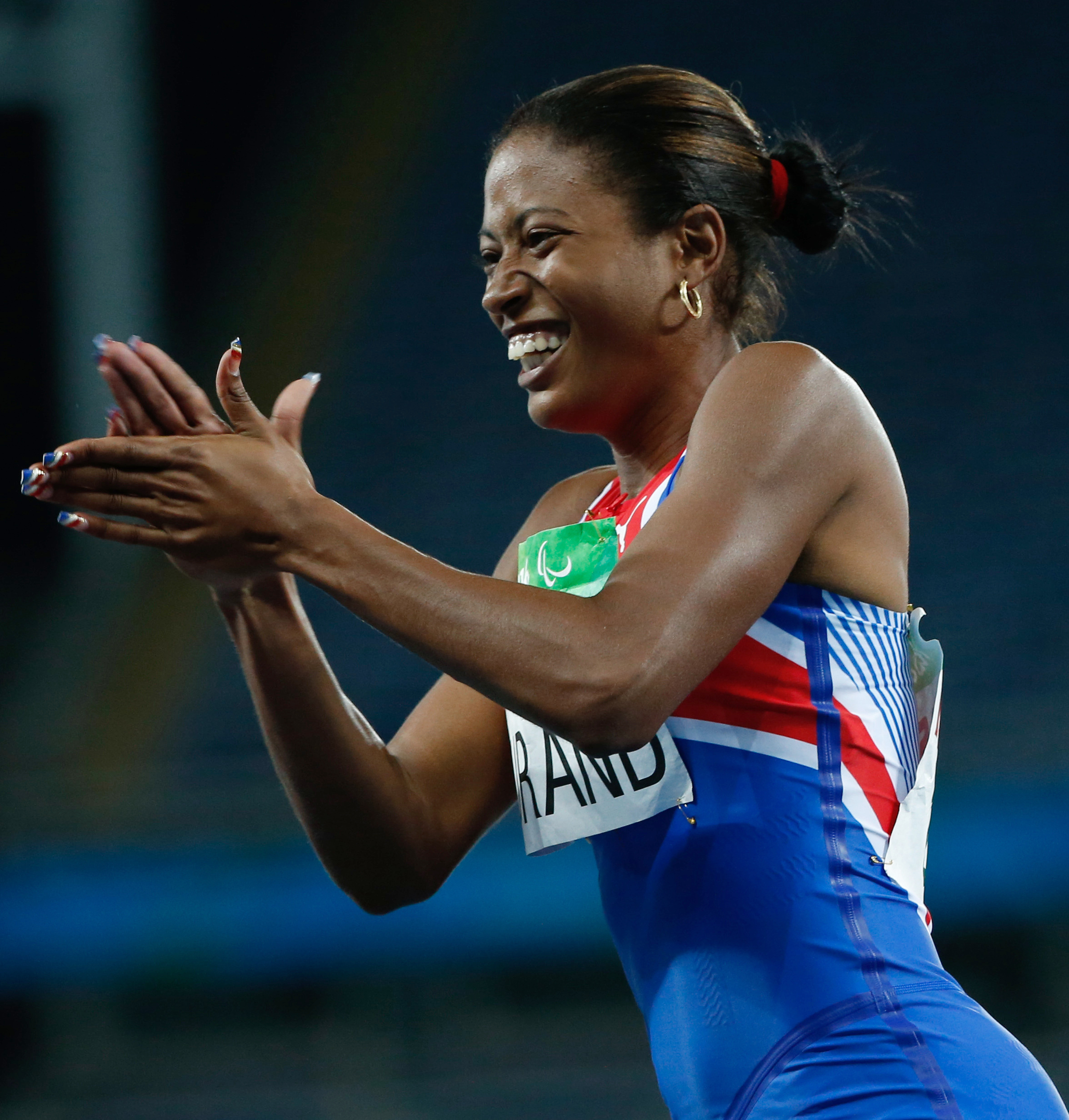 Rio de Janeiro - Cubana Omara Durand leva ouro nos 100m T12 nos Jogos Paralímpicos Rio 2016, no Estádio Olímpico.. (Fernando Frazão/Agência Brasil)